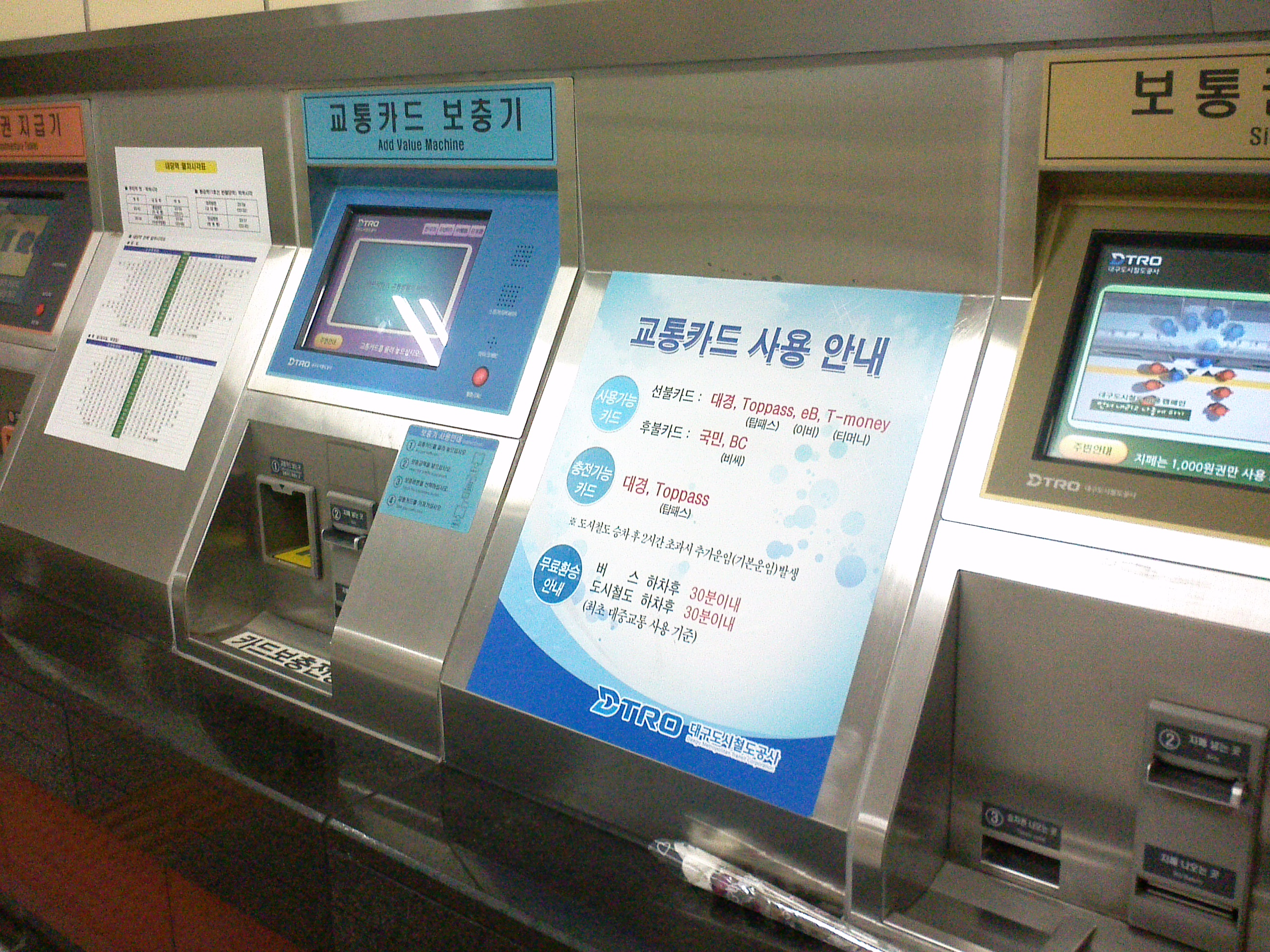 대구도시철도 교통카드 안내 표지